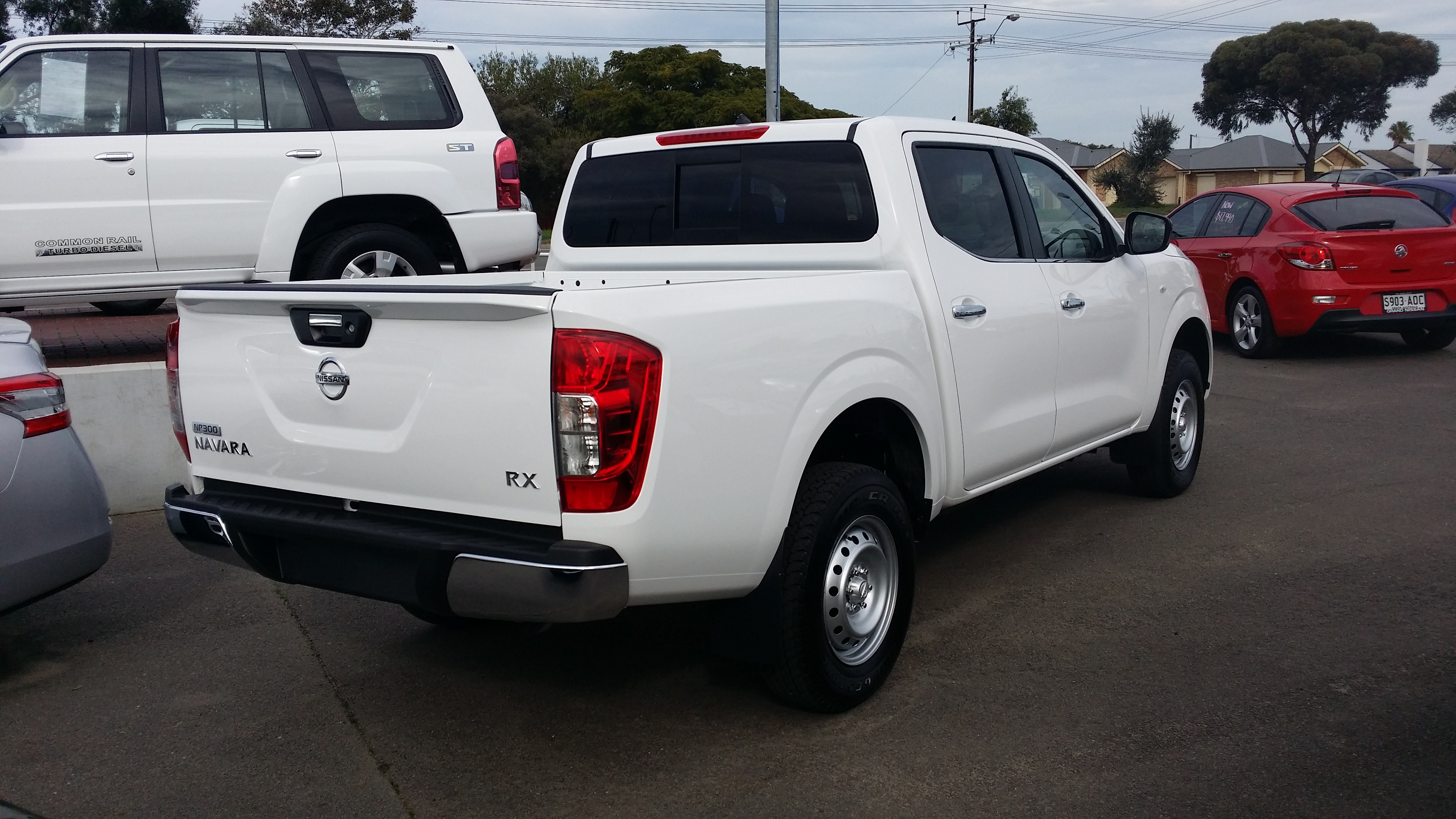 2015 Nissan Navara RX - NP300